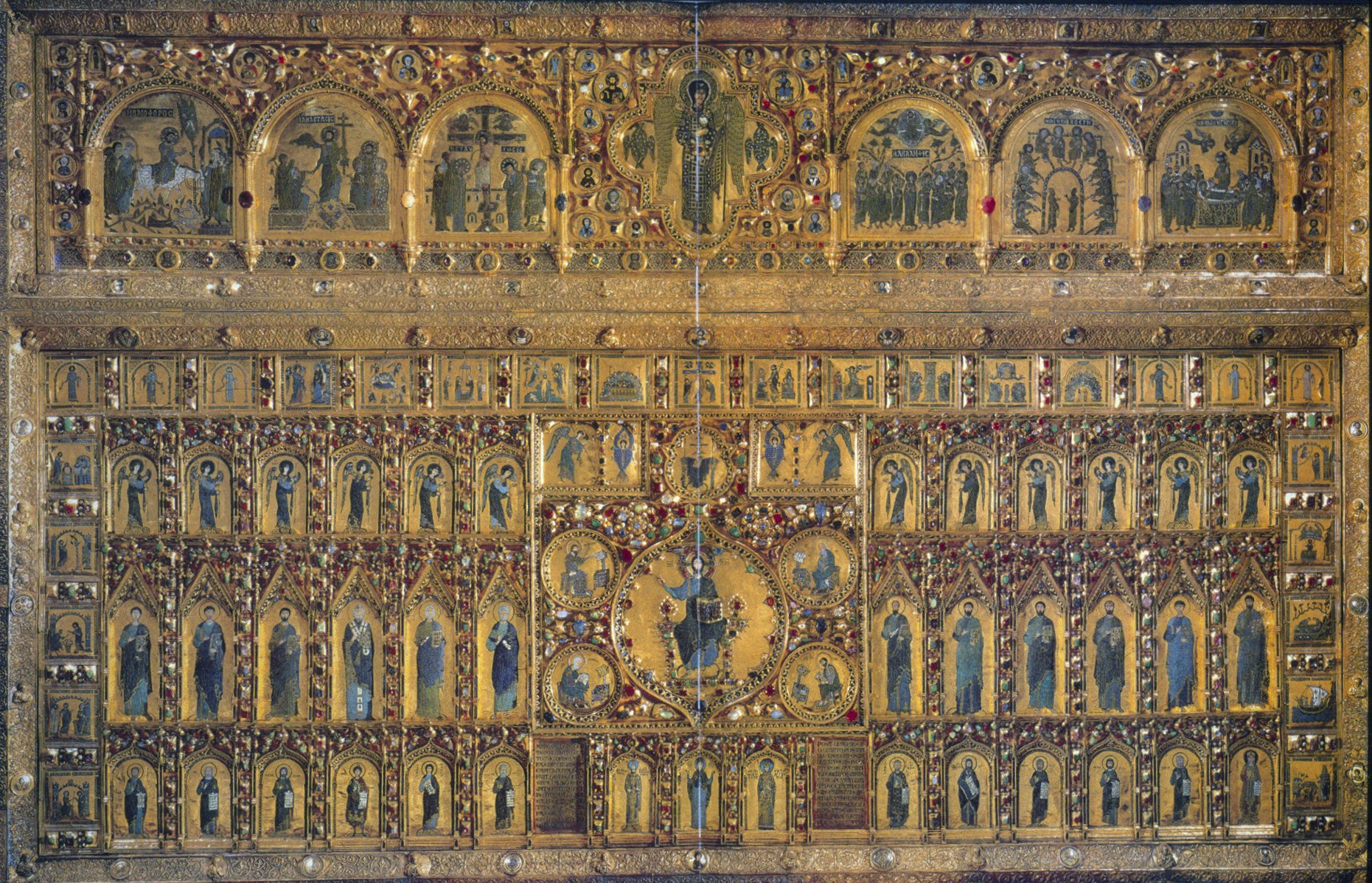 Пала д'Оро (золотой алтарь в базилике Святого Марка, Венеция)